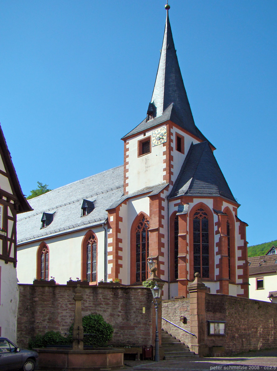 Innenansicht der evang. Kirche in Neckarsteinach.